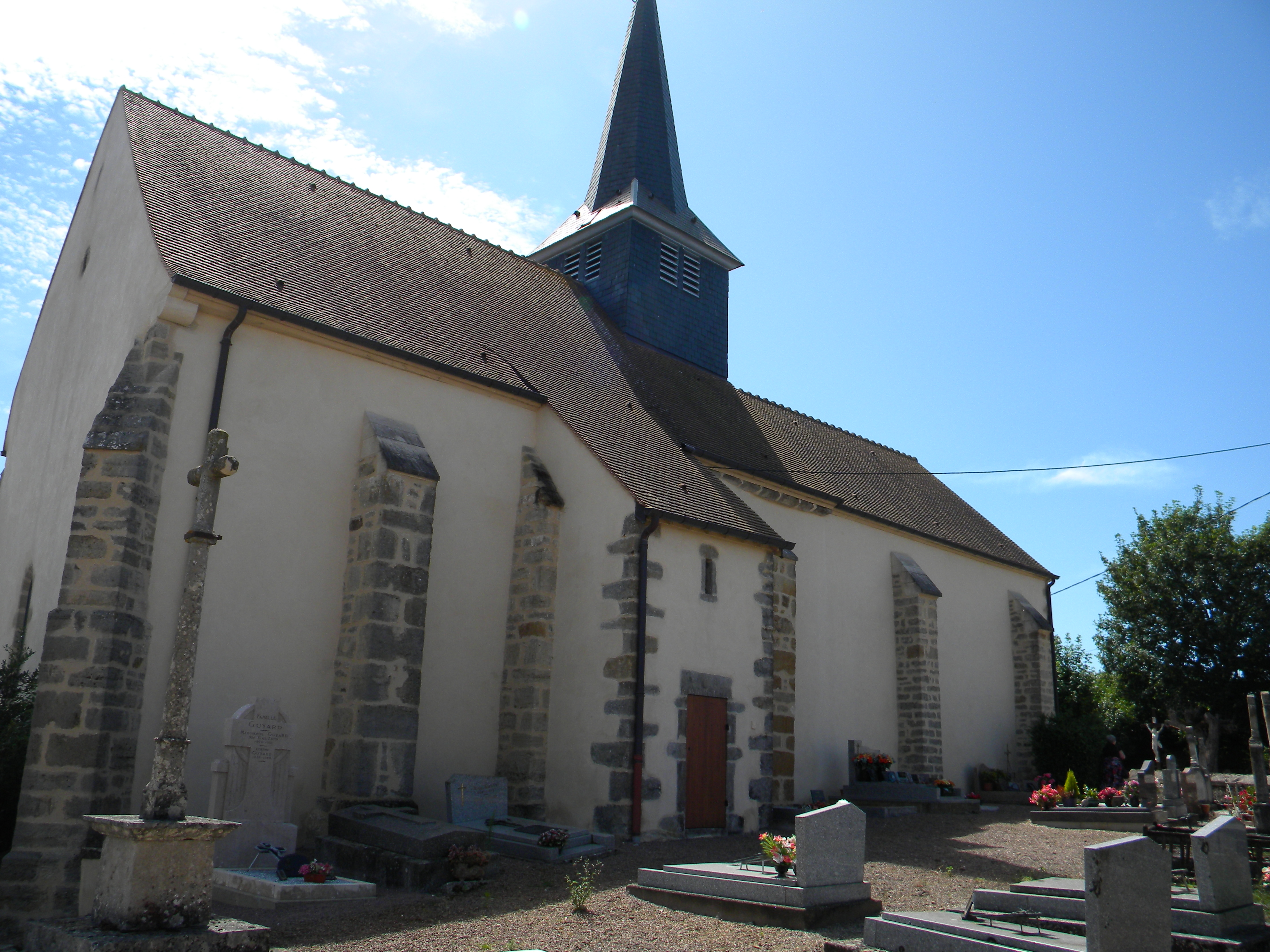 Kirko de Censerey